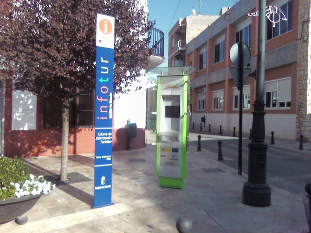 Oficina de turismo virtual de Promancha en la Plaza de España de Pedro Muñoz.